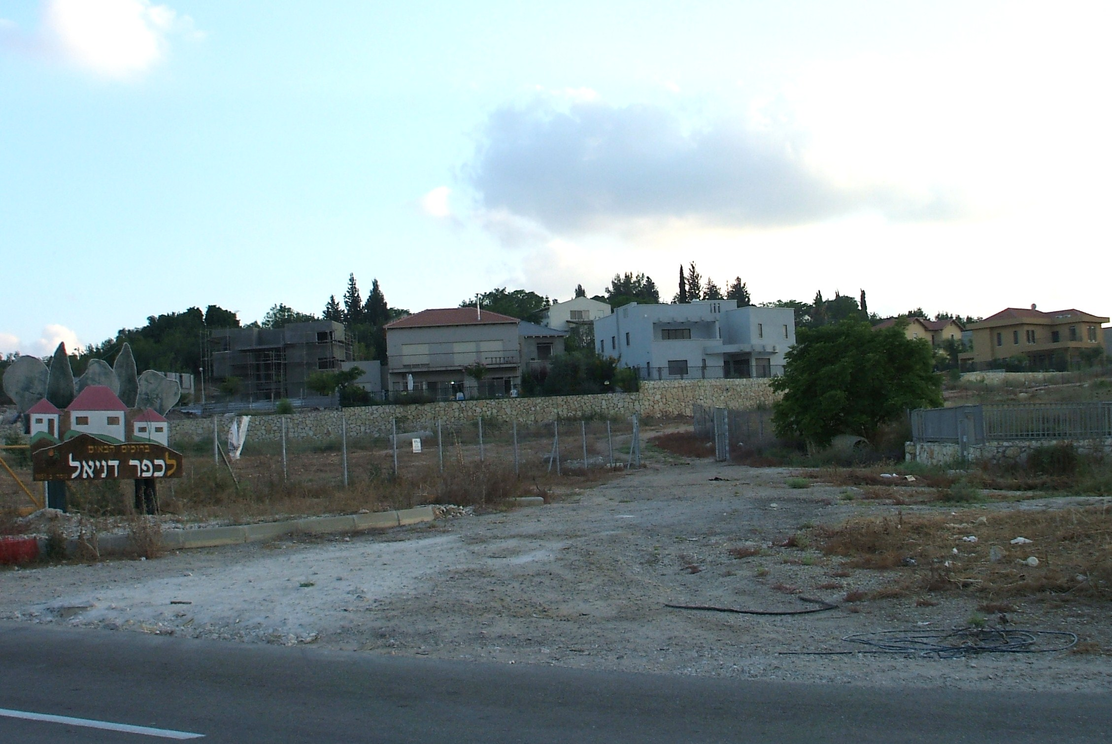 Moshav Kfar Daniel, Hevel Modi'in Regional Council, Israel הכניסה למושב כפר דניאל, מועצה אזורית חבל מודיעין, ישראל